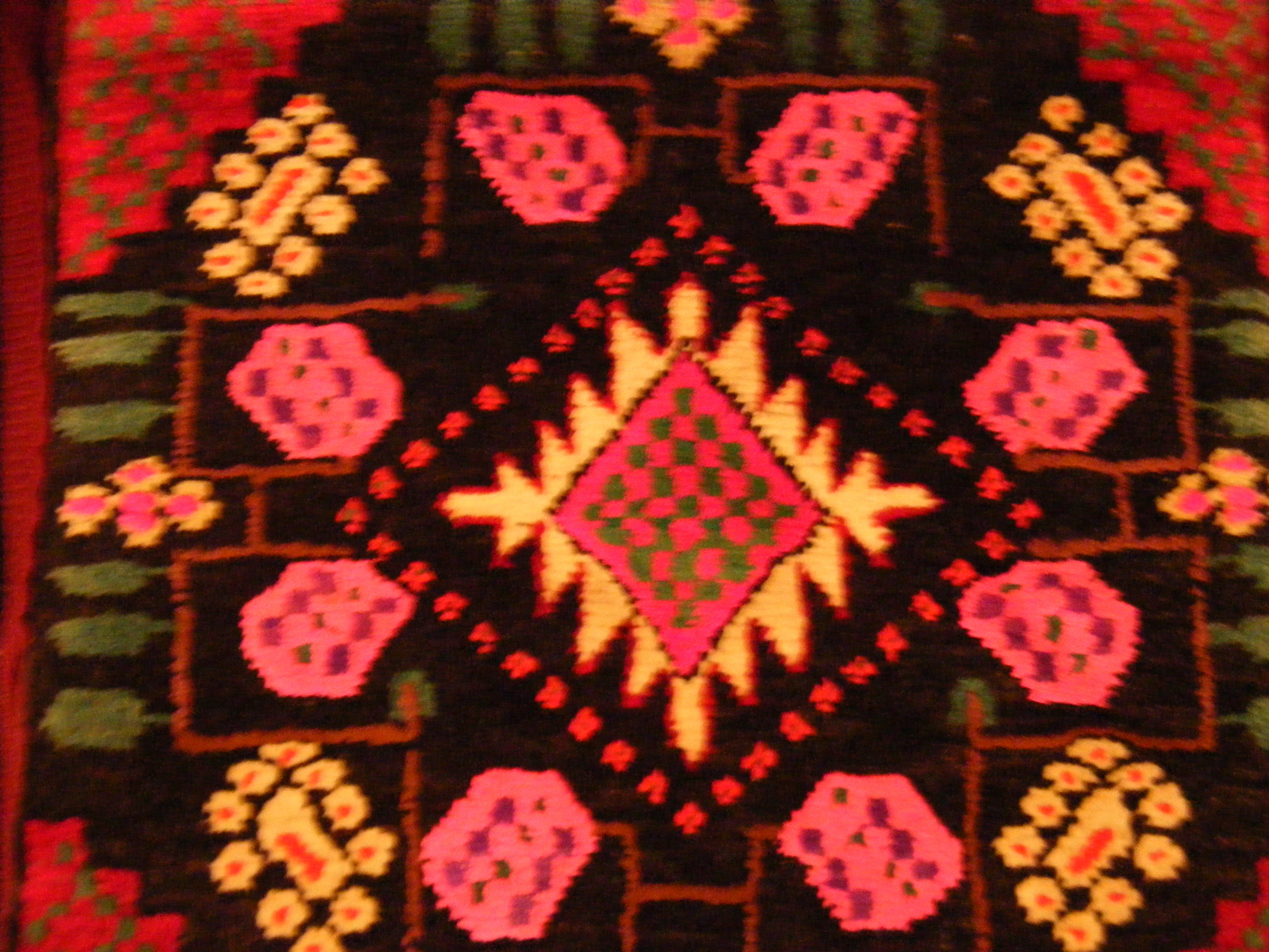 الدوشك الفيكاني، قطعة أثاث من بلدة الفيكة لبنان